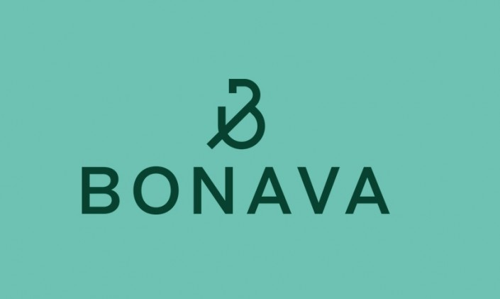 Bonava logo